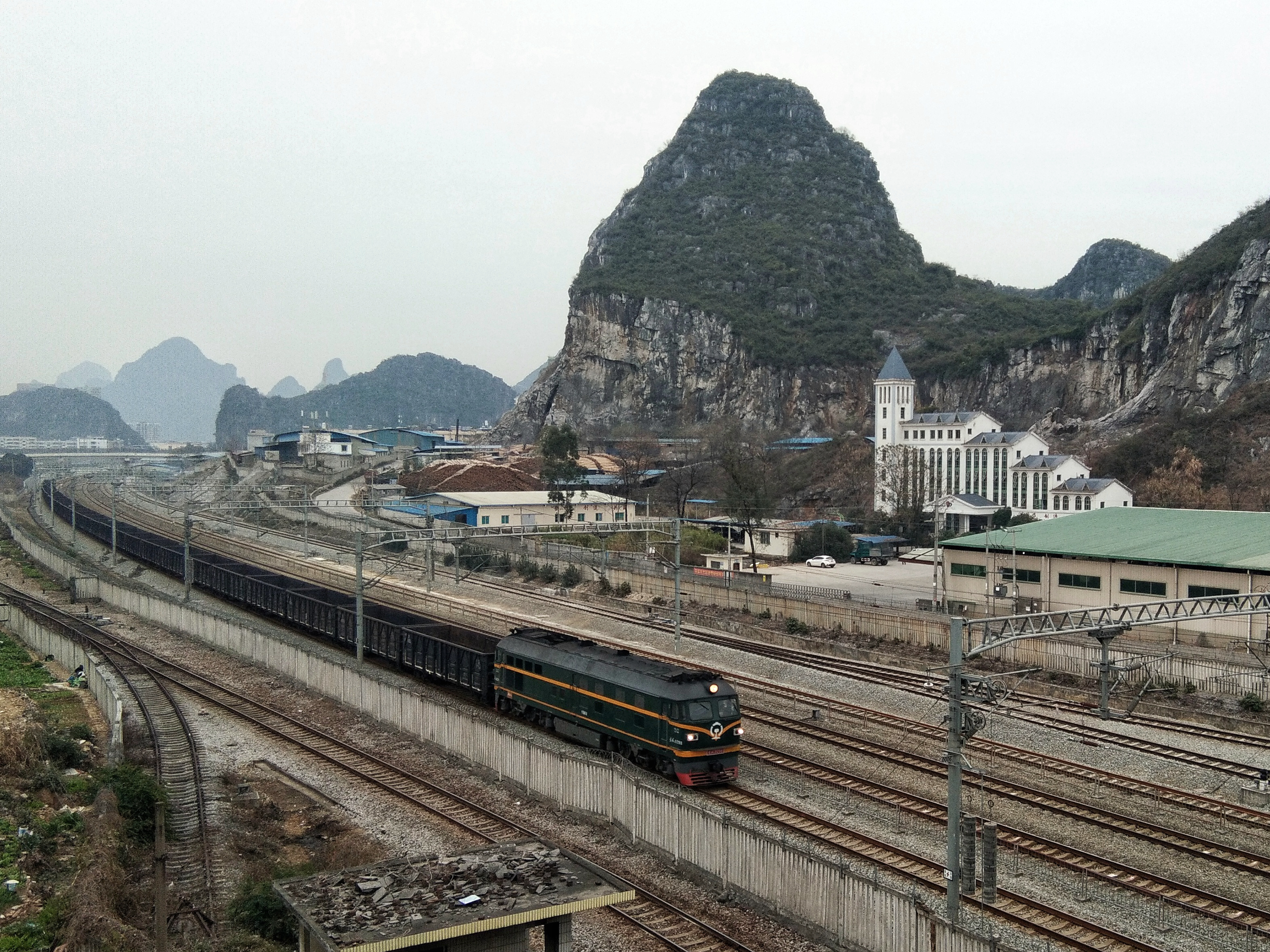 中文（中国大陆）: 柳州机务段9298号东风4B型内燃机车牵引下行货运列车反向进入二塘站